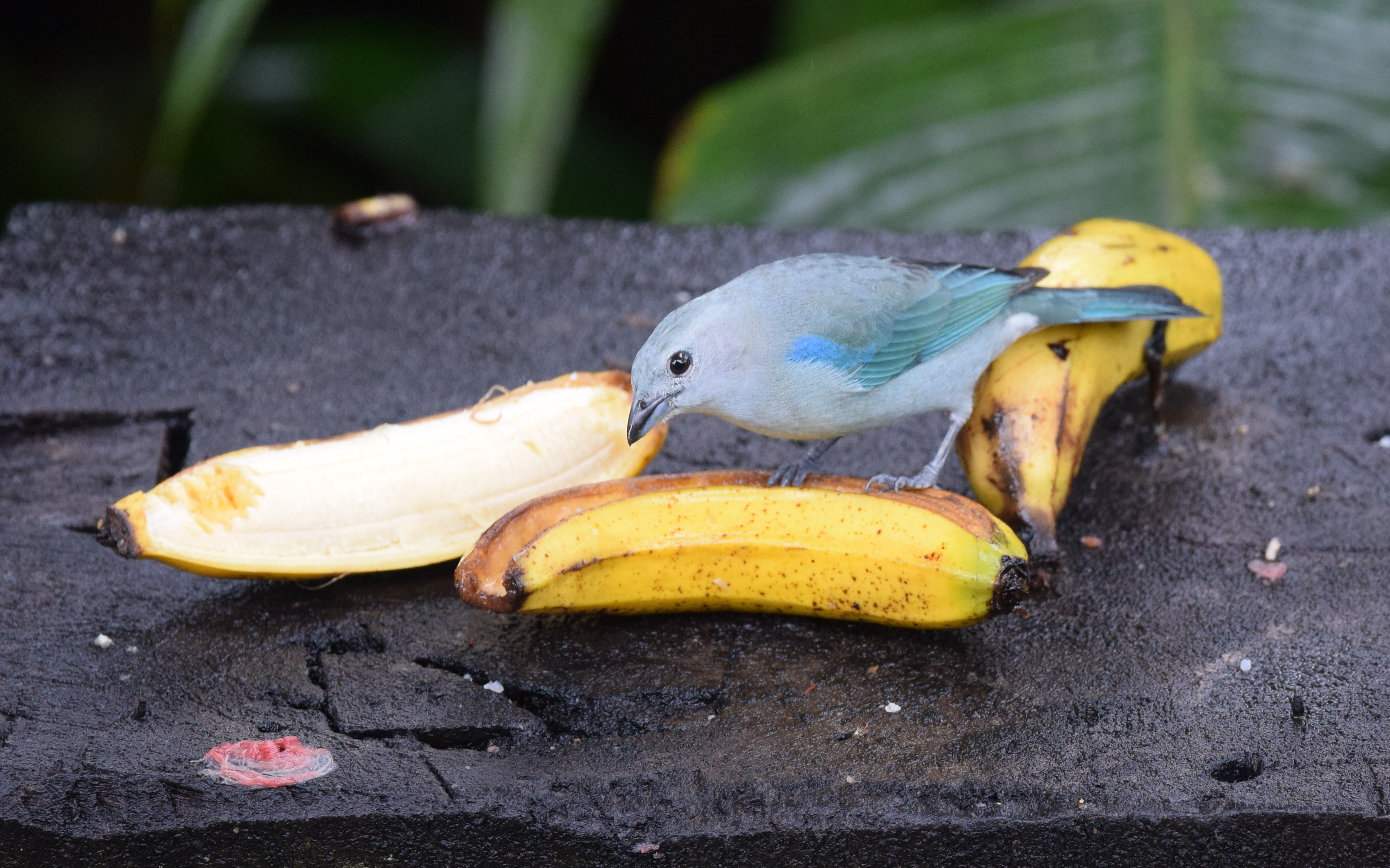 Costa Rica 2/9/16